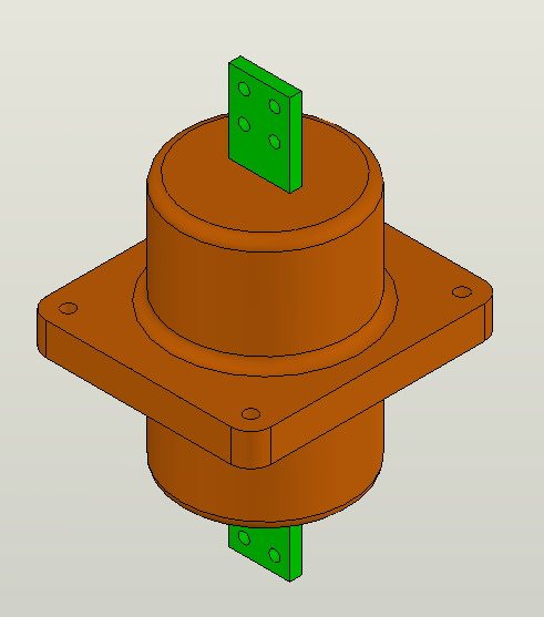 Трансформатор тока ТПОЛ-10 (Current transformer TPOL-10)